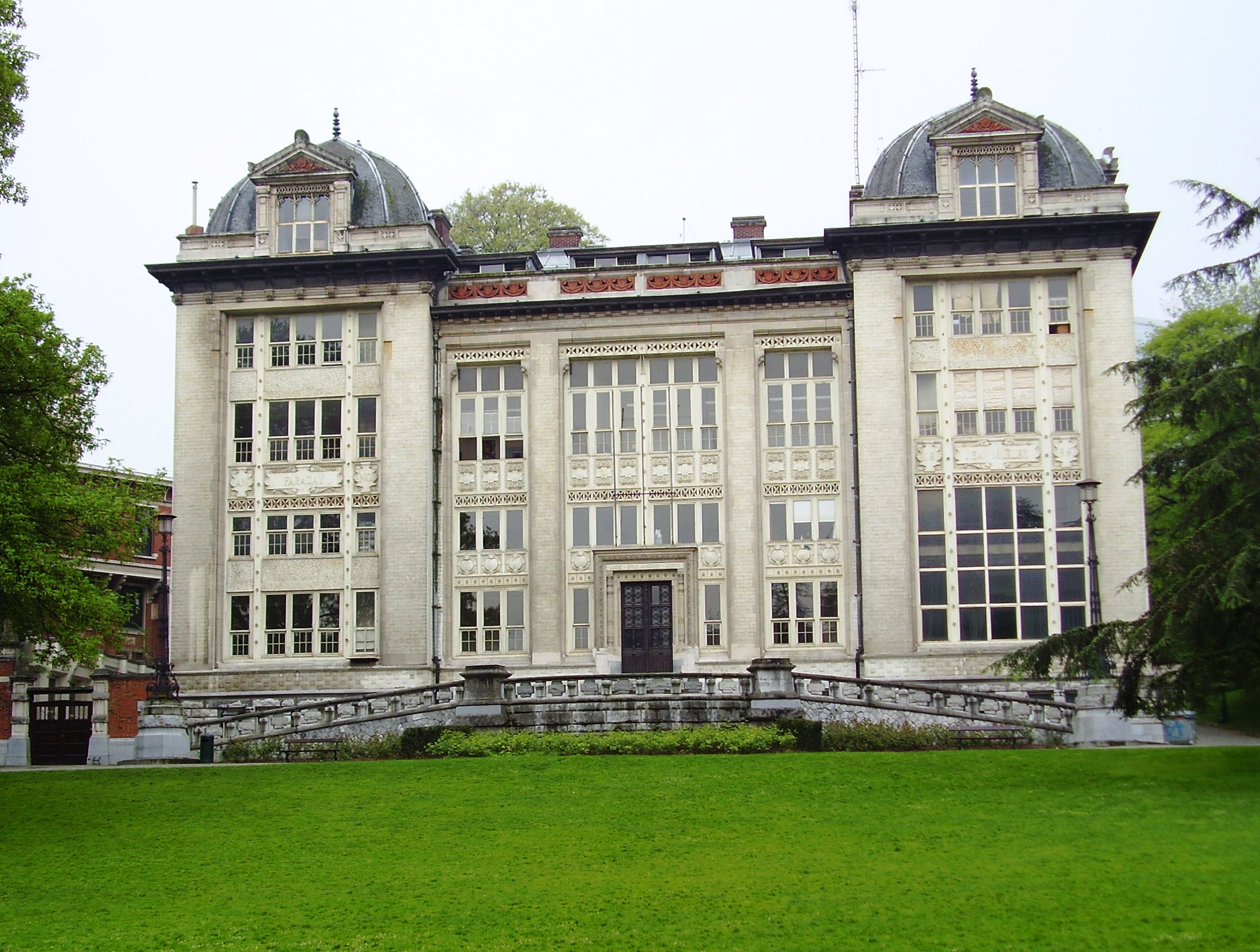 Parc Léopold, Bruxelles - Lycée Jacqmain, ancien institut de physiologie